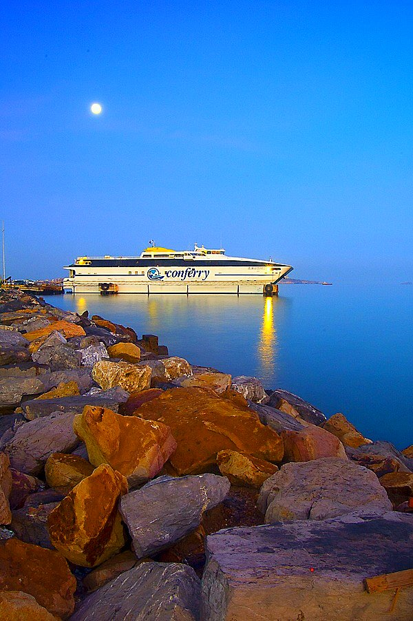 Ferry Port / Puerto de Ferry. Puerto la Cruz, Anzoátegui. Venezuela.